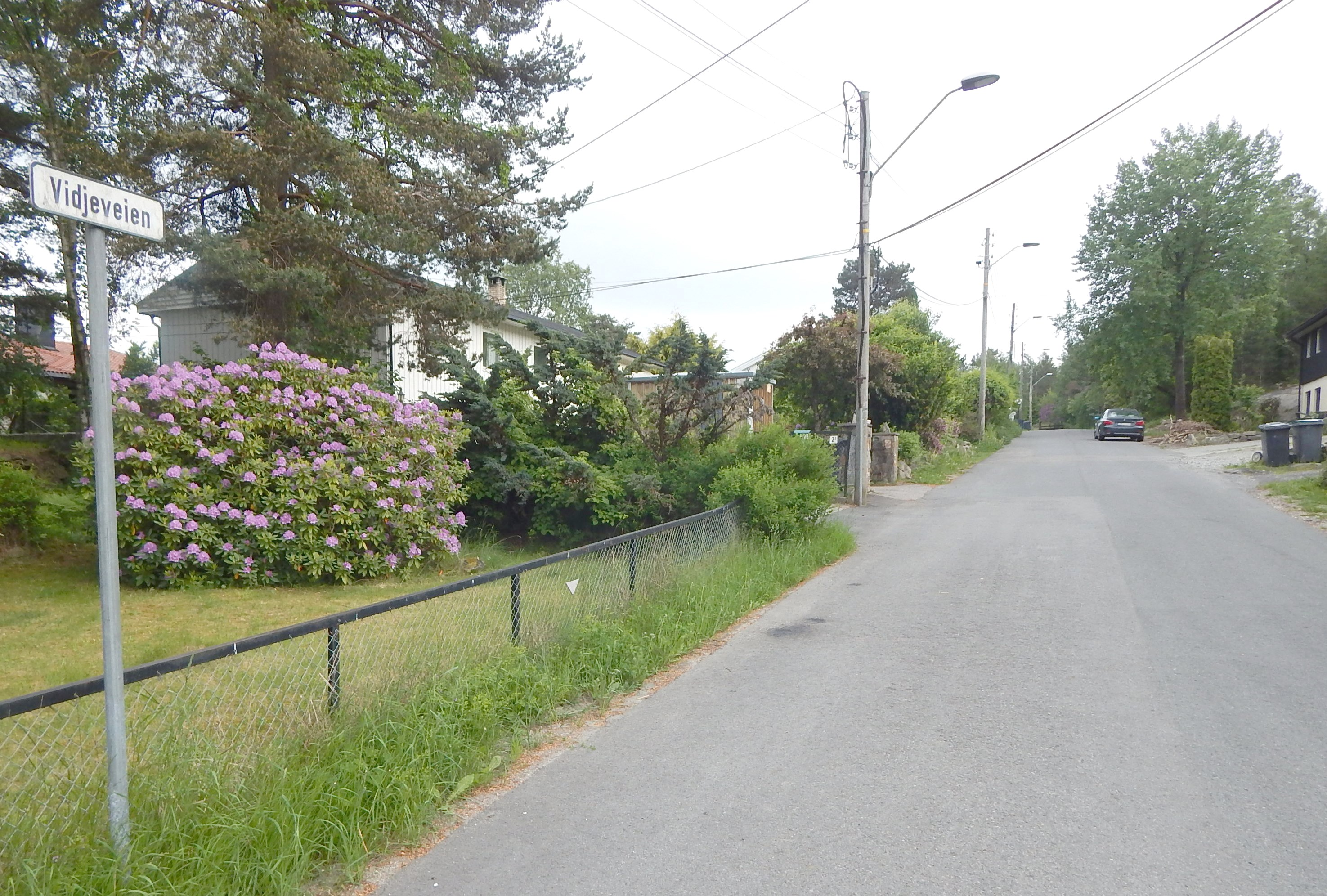 Vidjeveien sett fra Vardeveien